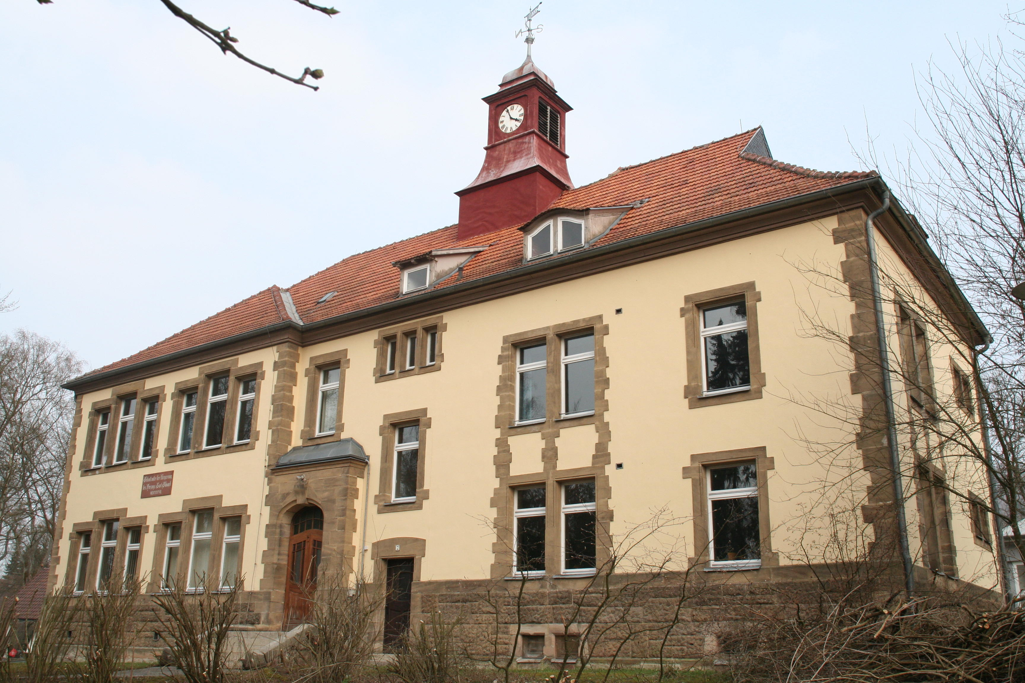 Schule in Cortendorf, Coburg